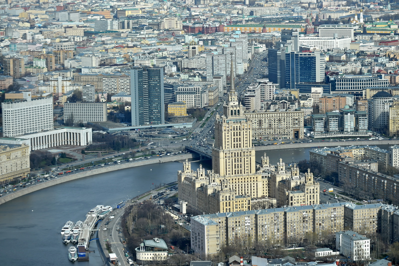 Отель "Украина" (вид от Москва-Сити)